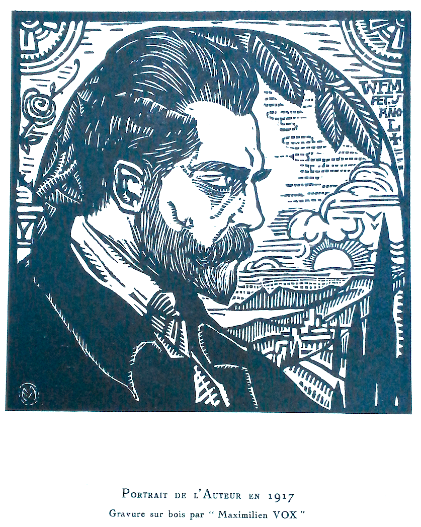 Le pasteur Wilfred Monod en 1917, à l'âge de 50 ans - gravure sur bois de son fils Maximilien Vox, image publiée dans le livre de mémoires de Wilfred Monod, "Après la journée" (Grasset, 1938)